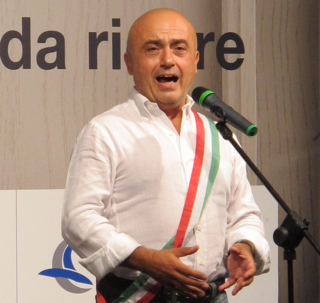 Il comico romagnolo Paolo Cevoli interpreta il personaggio dell'assessore di Roncofritto, Palmiro Cangini, nel corso di un'esibizione a Rimini nel settembre 2012.